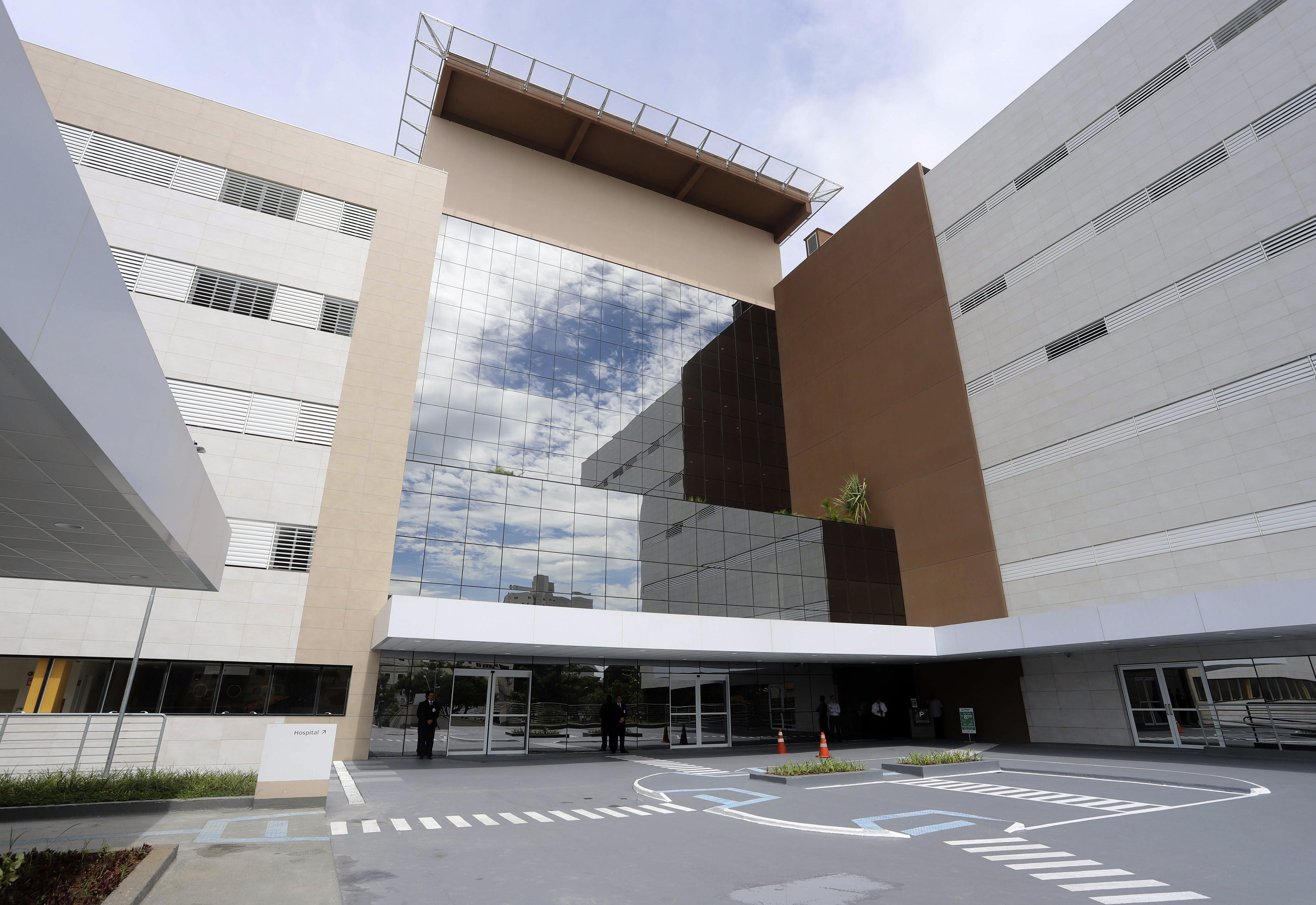 O governador do Estado de São Paulo, Geraldo Alckmin, participa da cerimônia de inauguração do Hospital Regional de São José dos Campos. Local: São José dos Campos/SP Data: 02/04/2018 Foto: Governo do Estado de São Paulo